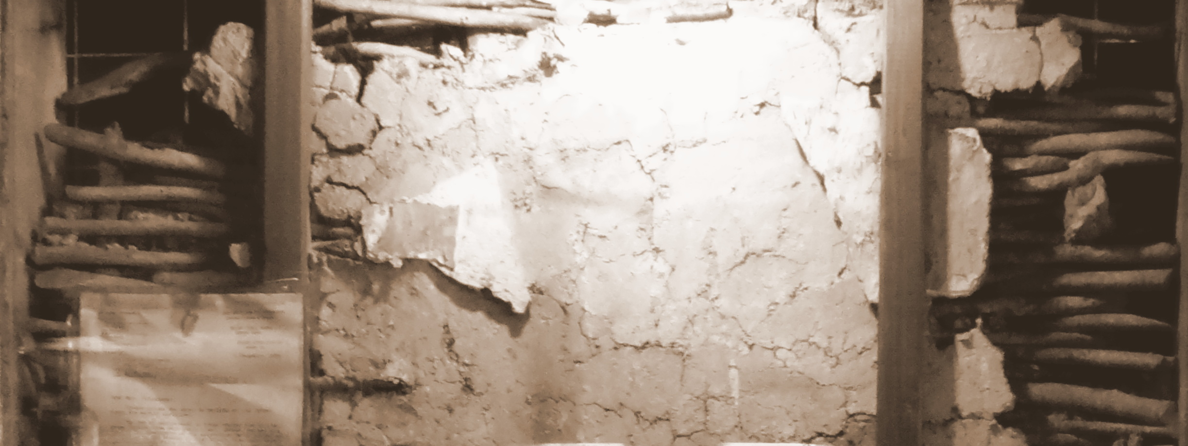 Athlone - sean's bar - vestige de mur IXéme siècle